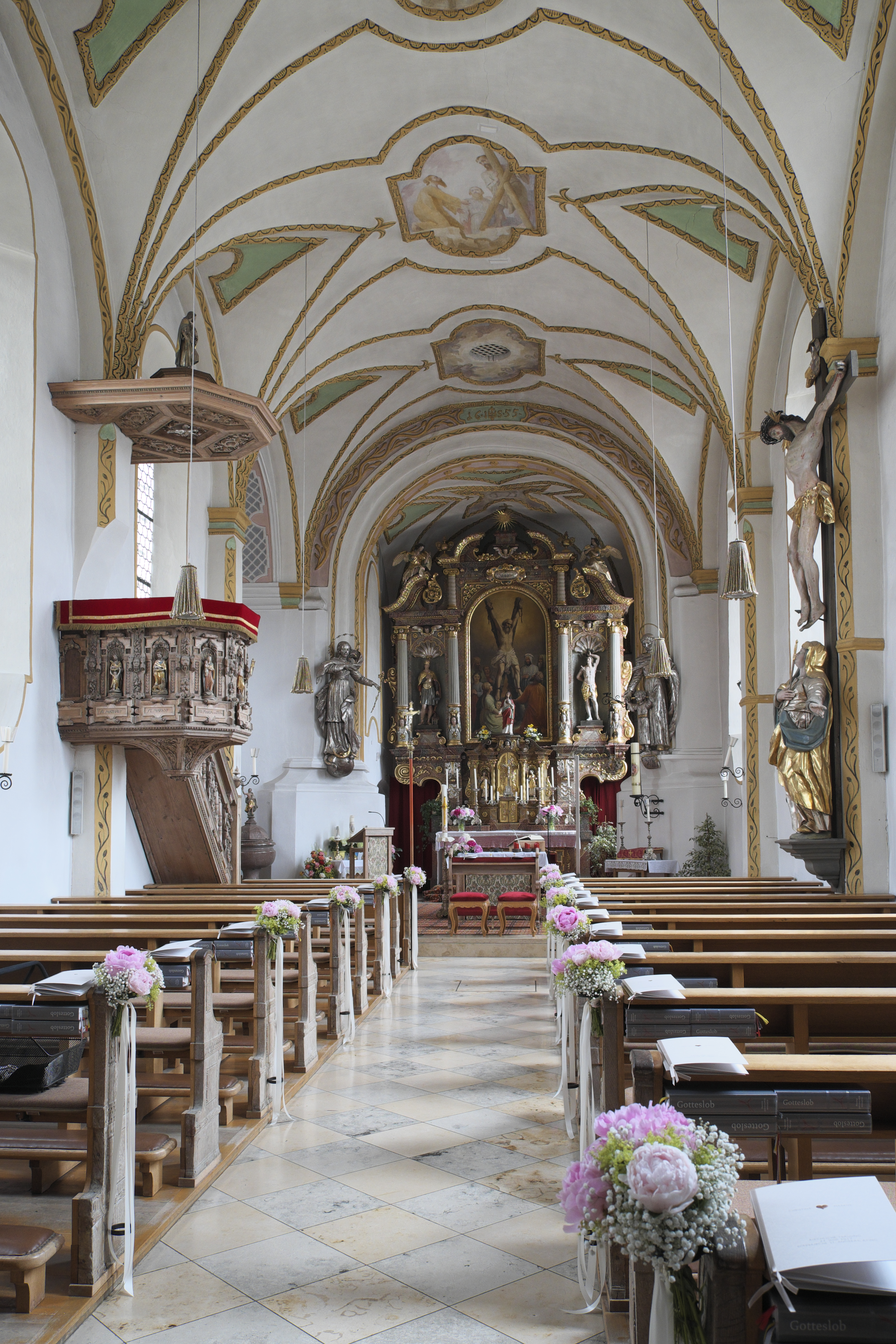 Katholische Pfarrkirche St. Andreas in Aying im Landkreis München (Bayern/Deutschland), Innenraum